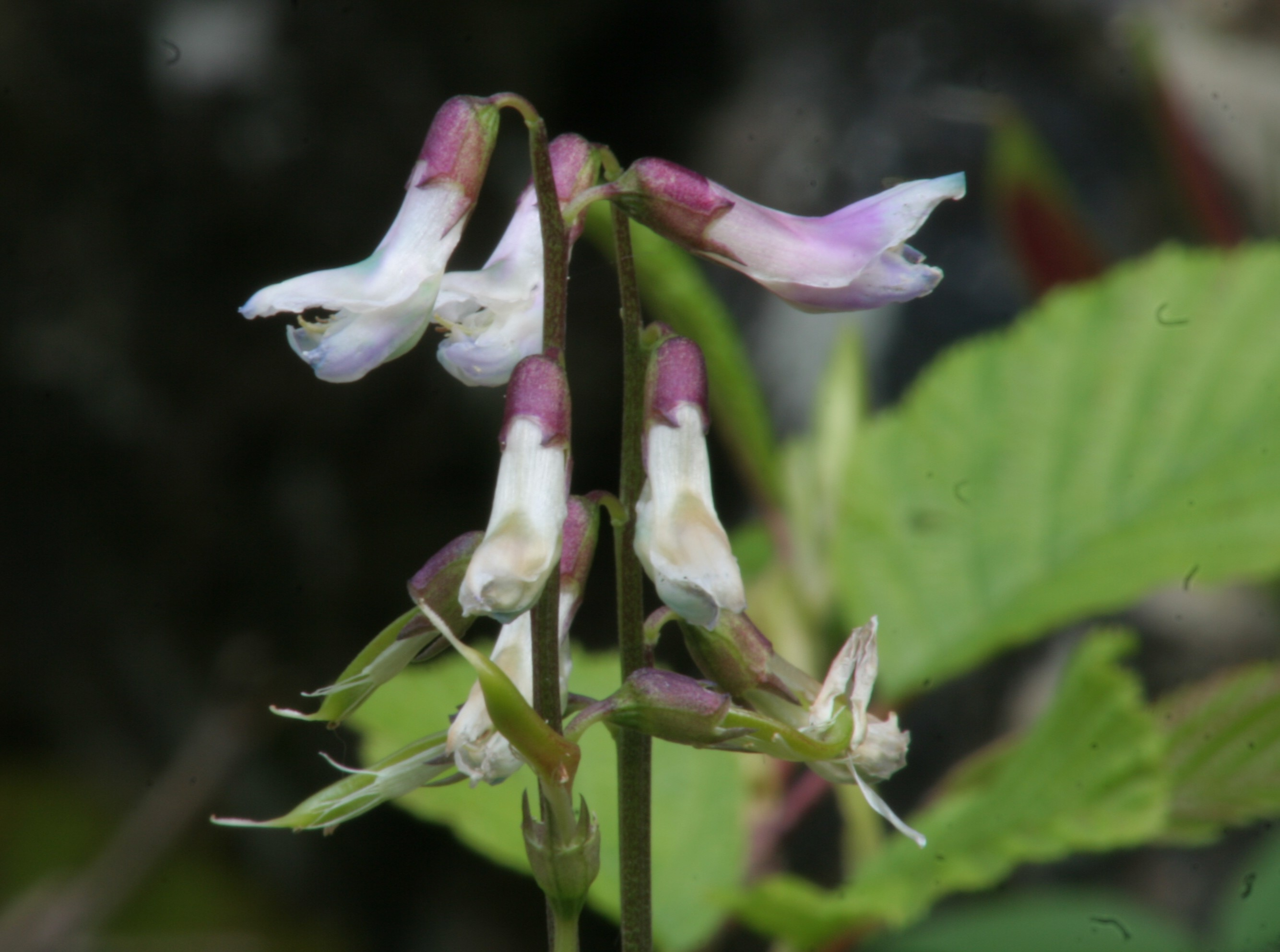 Lathyrus_vernus (Cicerchia primaticcia) Località Val Piana, Limana (BL), 850 m s.l.m.